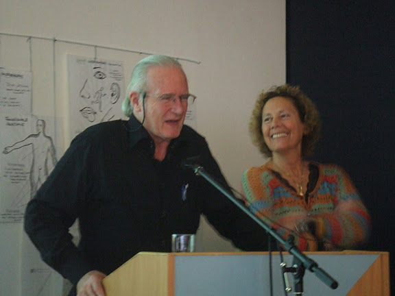 Lenny Maietta und Frank Hatch halten eine Festansprache. Der Schnappschuß wurde anläßlich der MH-Kinaesthetics Zertifizierung des Sophienspitals am 4. Februar 2011 in Wien gemacht